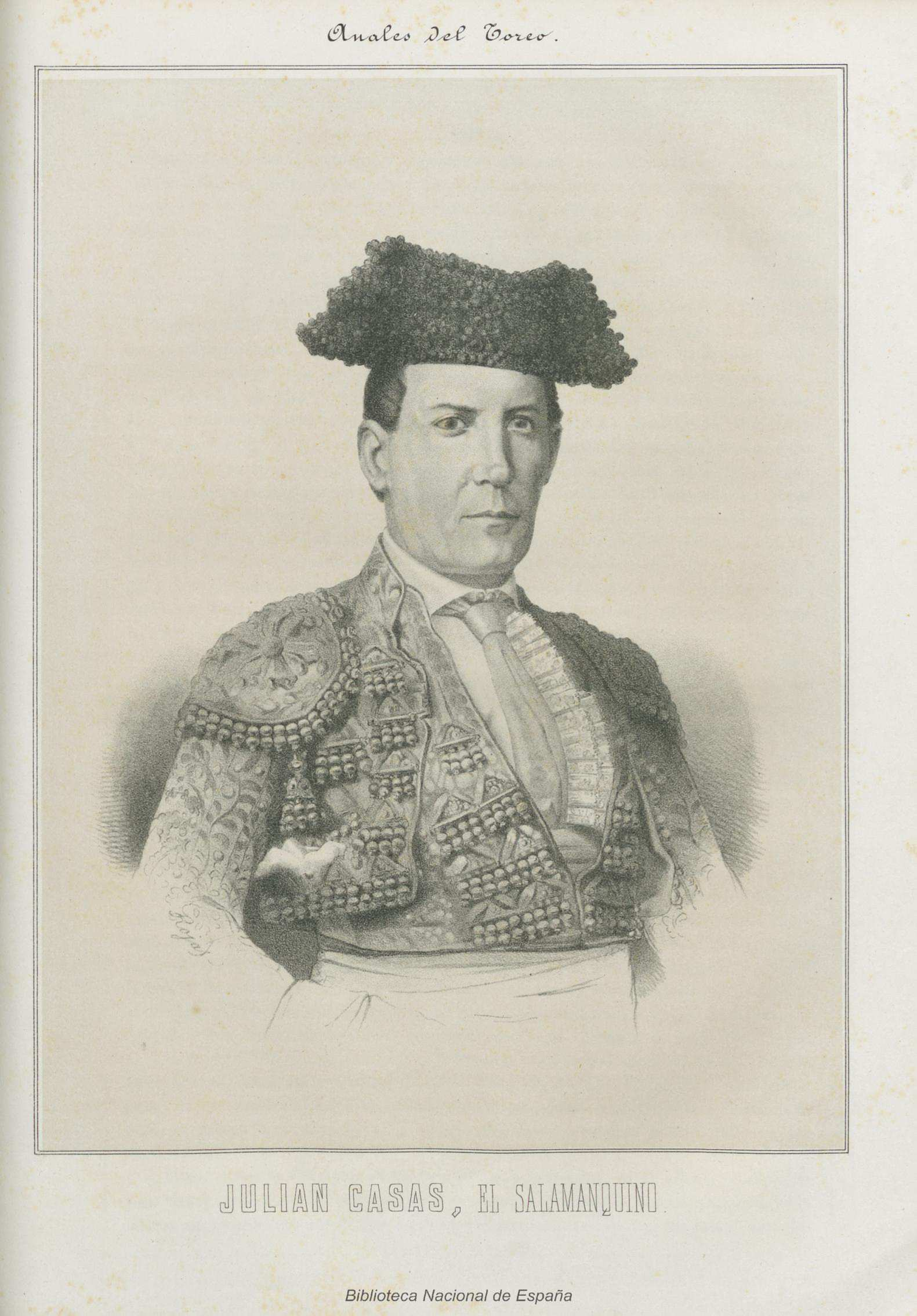 Julián Casas, el Salamanquino, litografía de Rojas. ilustración de Anales del toreo : reseña histórica de la lidia de reses bravas : galería biográfica de los principales lidiadores: razón de las primeras ganaderías españolas, sus condiciones y divisas obra escrita por José Velázquez y Sánchez; e ilustrada por reputados artistas, Madrid, 1888.